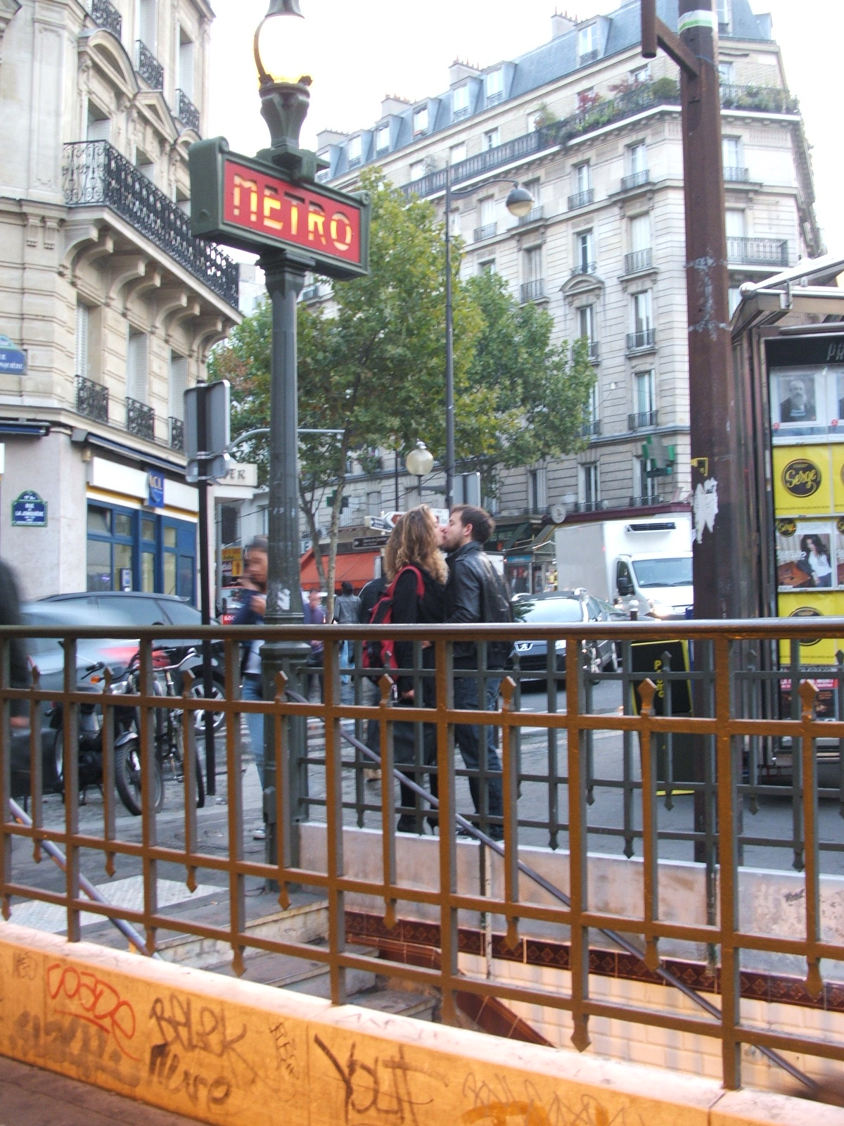 Accès à la station de métro Guy Moquet, Paris, France.